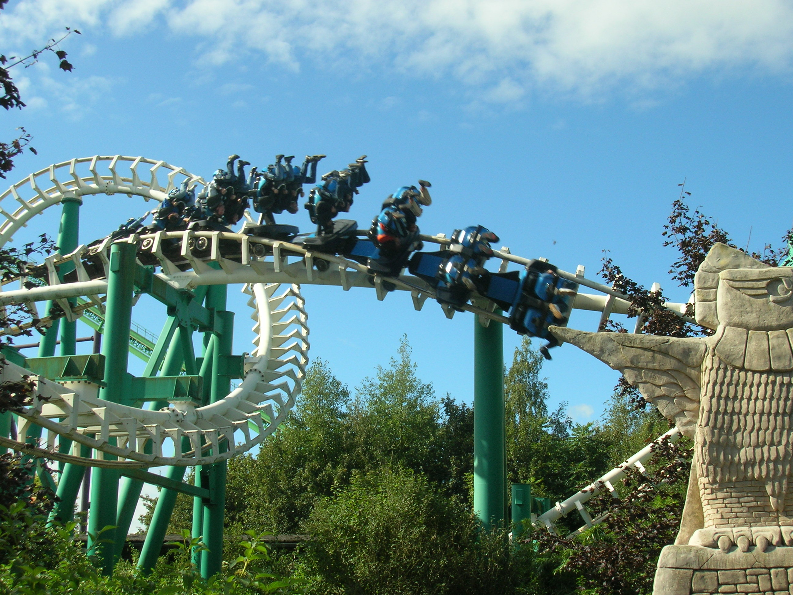 Montagnes russes inversée "El Condor" du parc d'attraction néerlandais Walibi World.